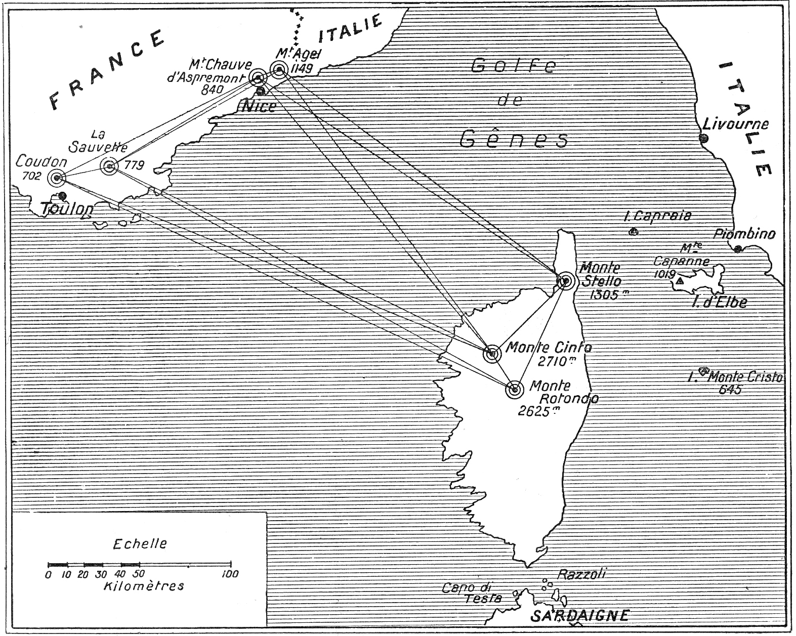 Illustration de la jonction géodésique directe de la Corse à la France Continentale